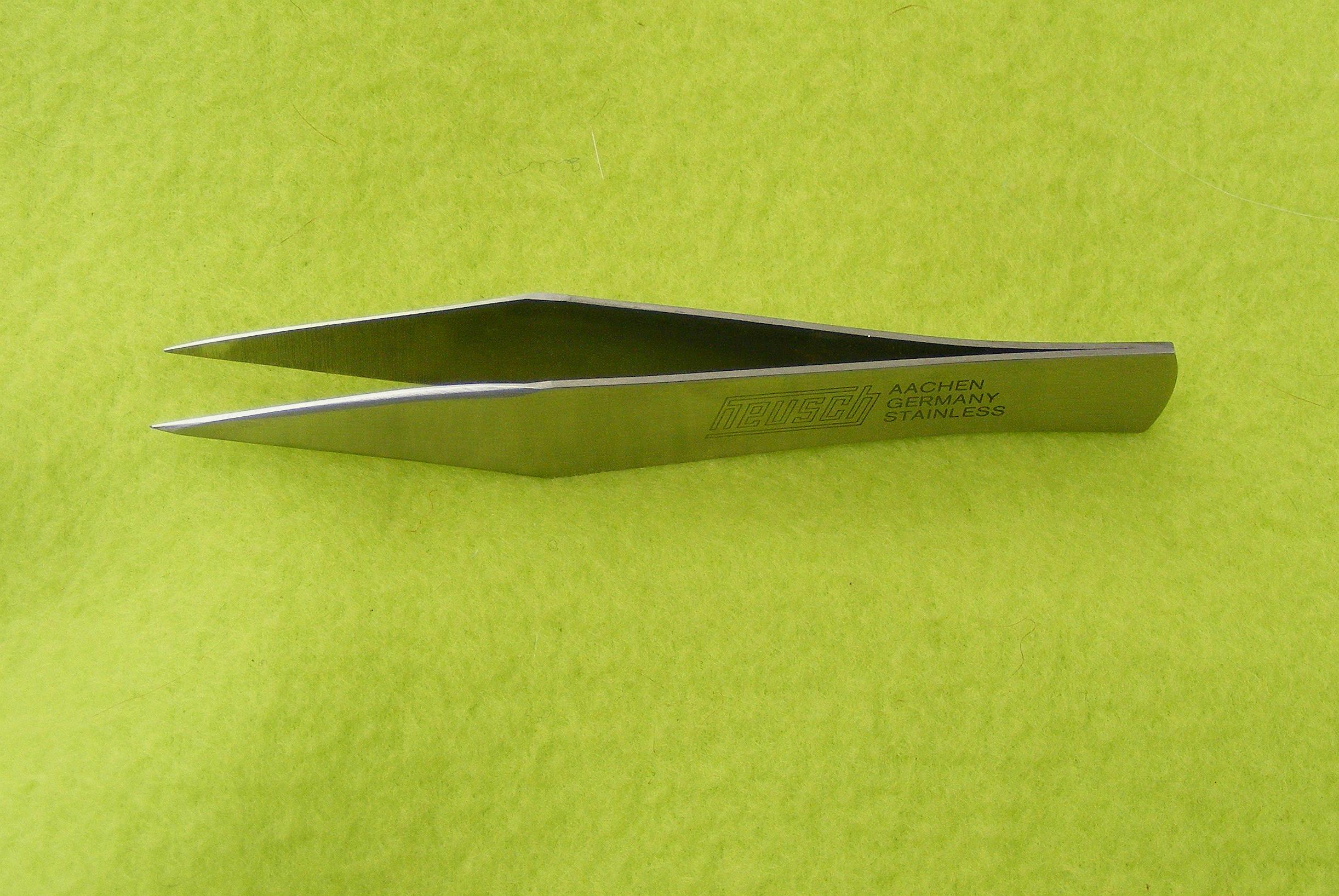 Textilindustrie Noppeneisen